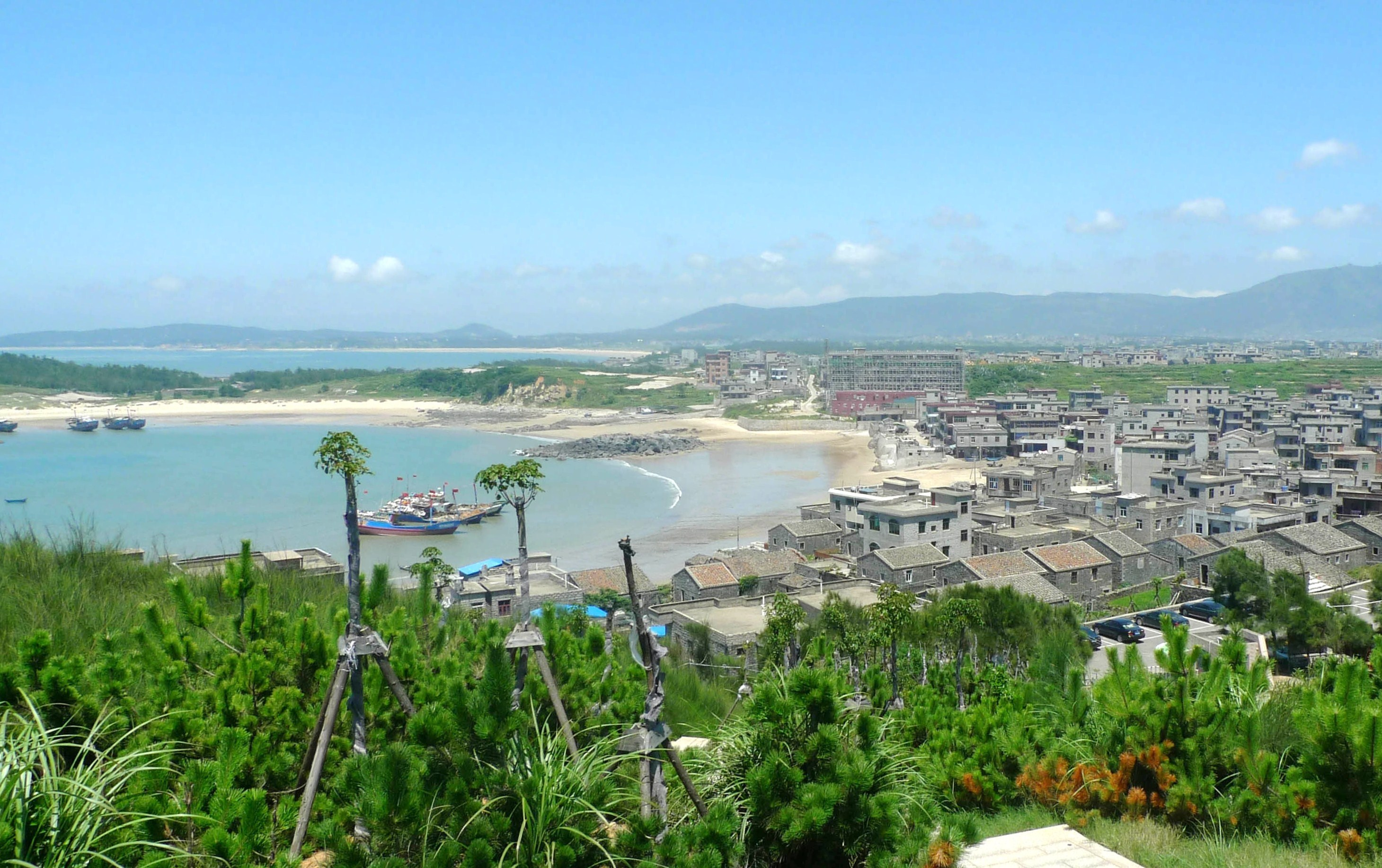 Pingtan Beach